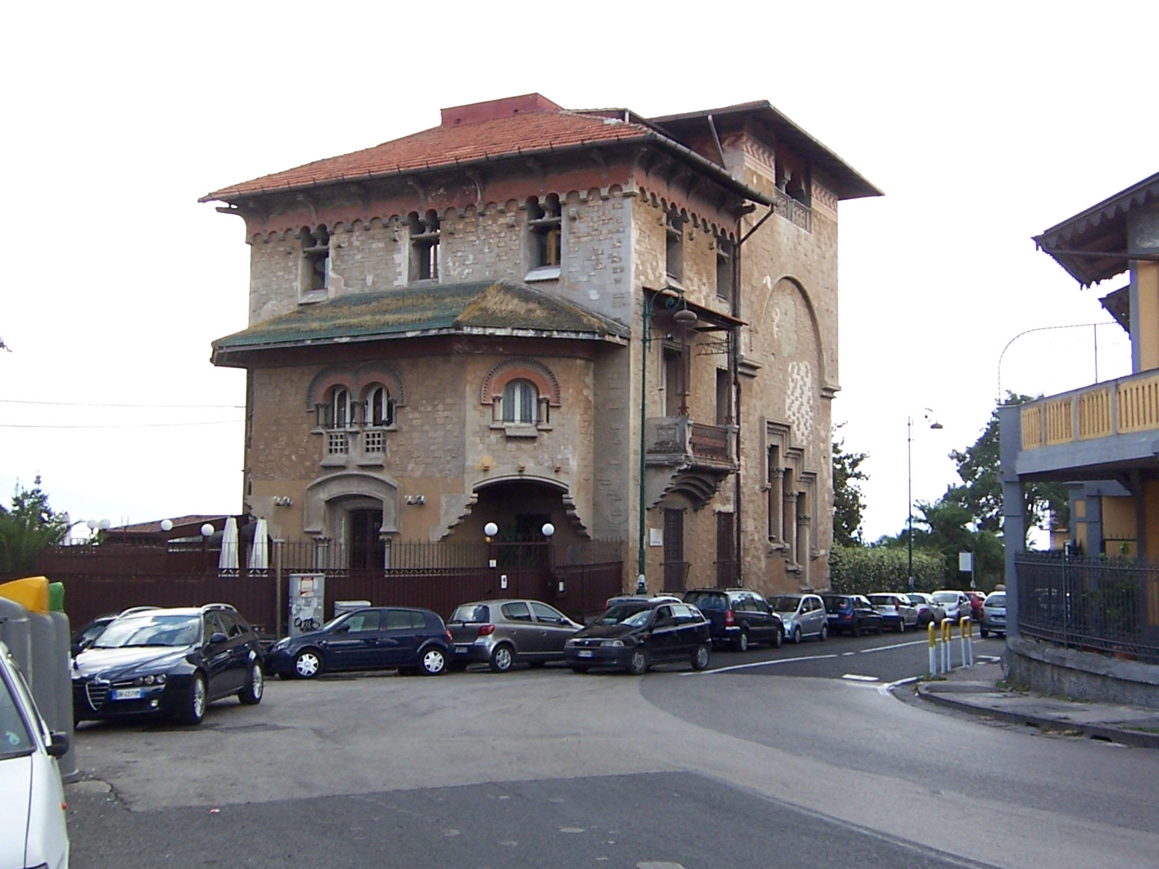 Villa Spera al Vomero, napoli